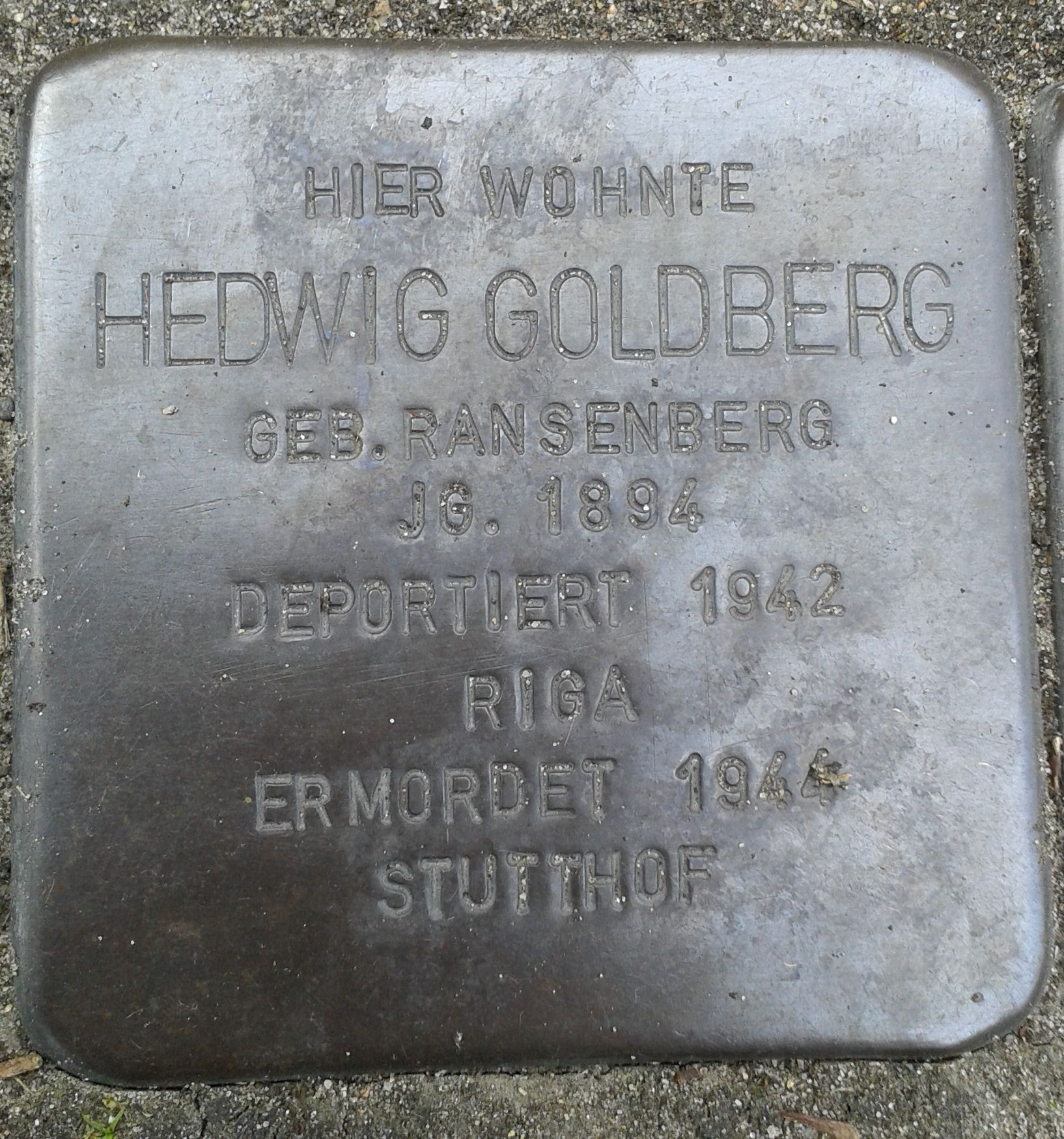 Stolperstein Datteln Carl-Gastreich-Straße 5 Hedwig Goldberg